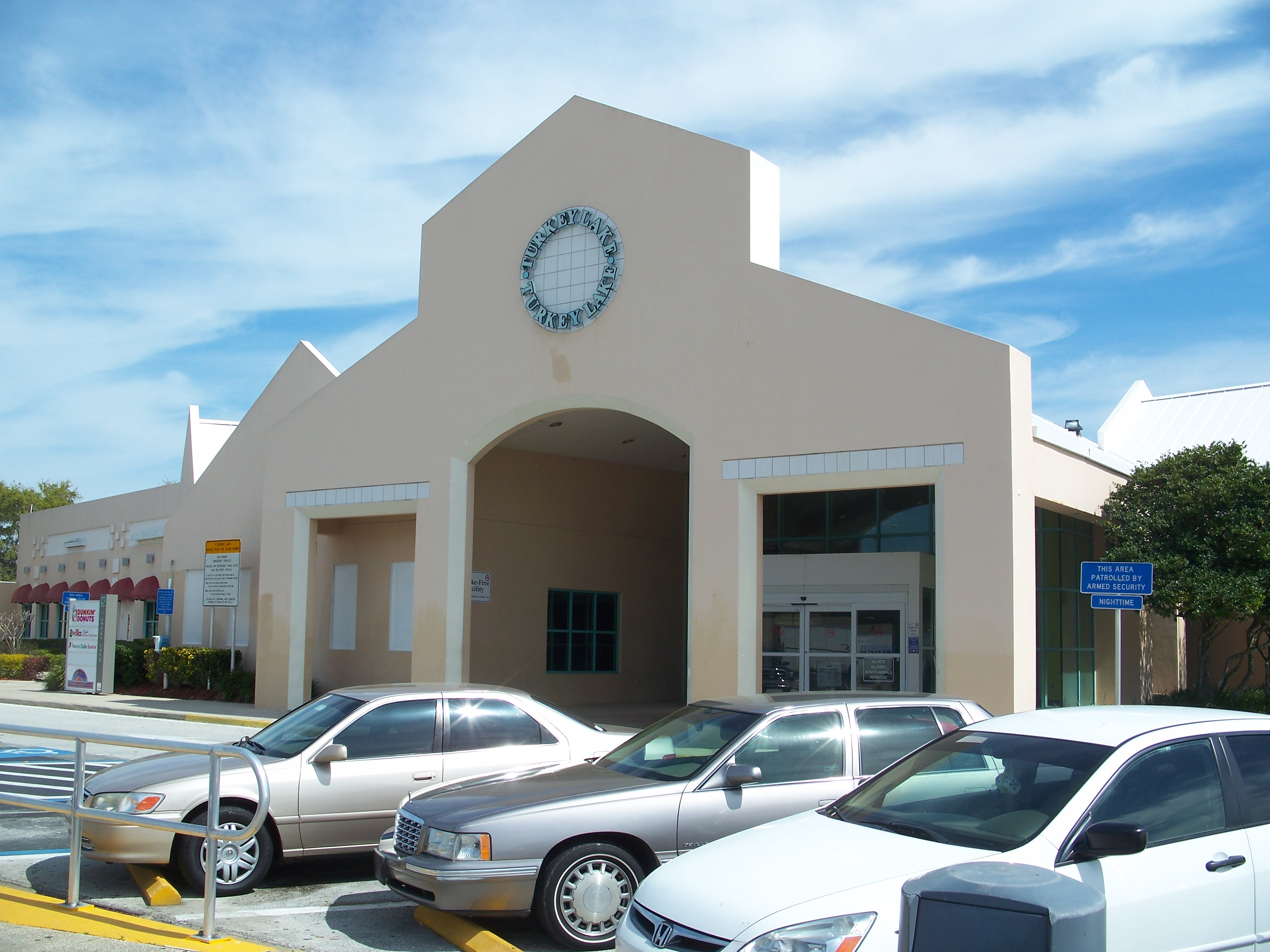 Florida's Turnpike: Turkey Lake Plaza